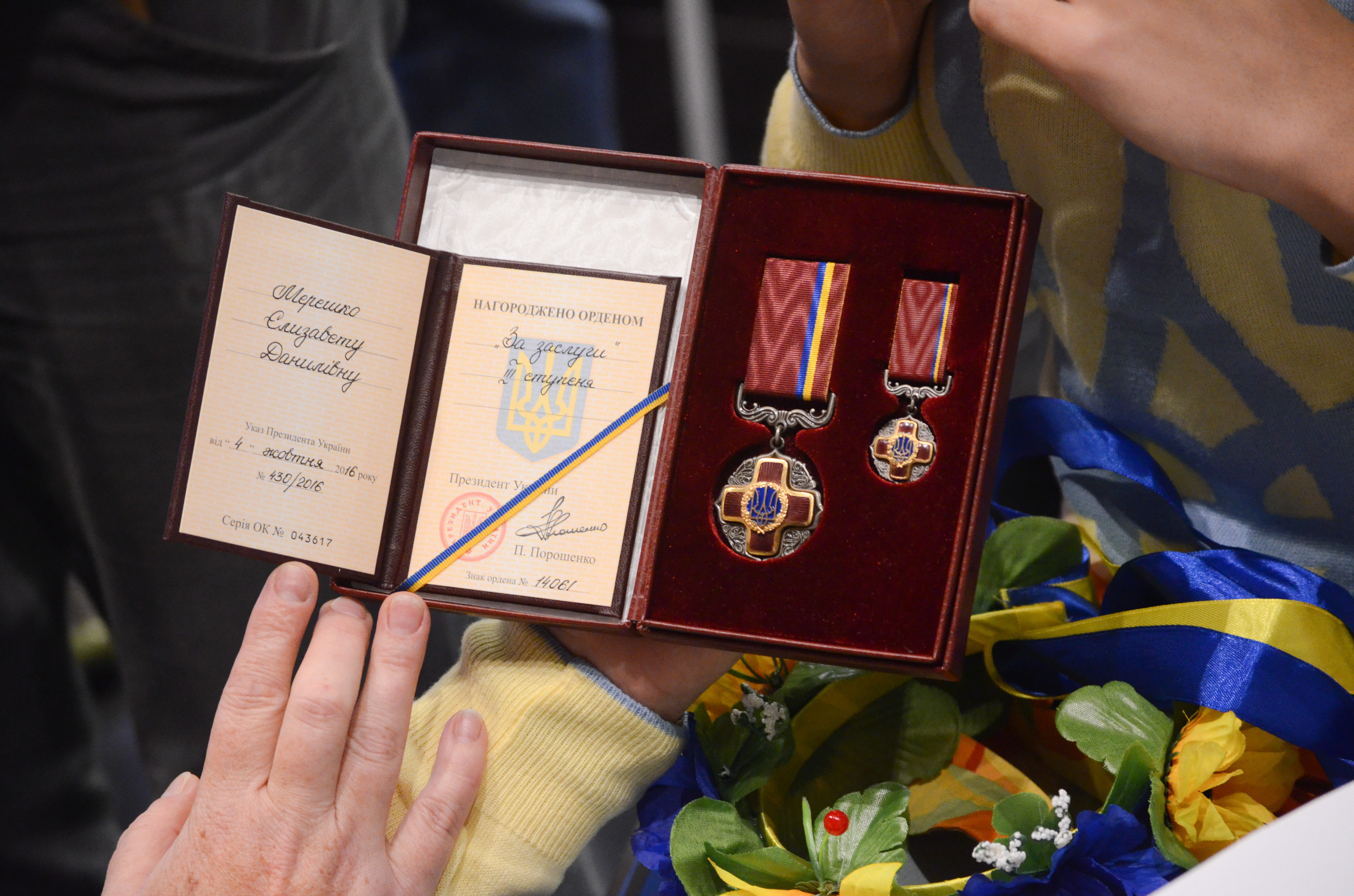 Зустріч Президента України з олімпійцями та паралімпійцями — учасниками Ріо-2016.